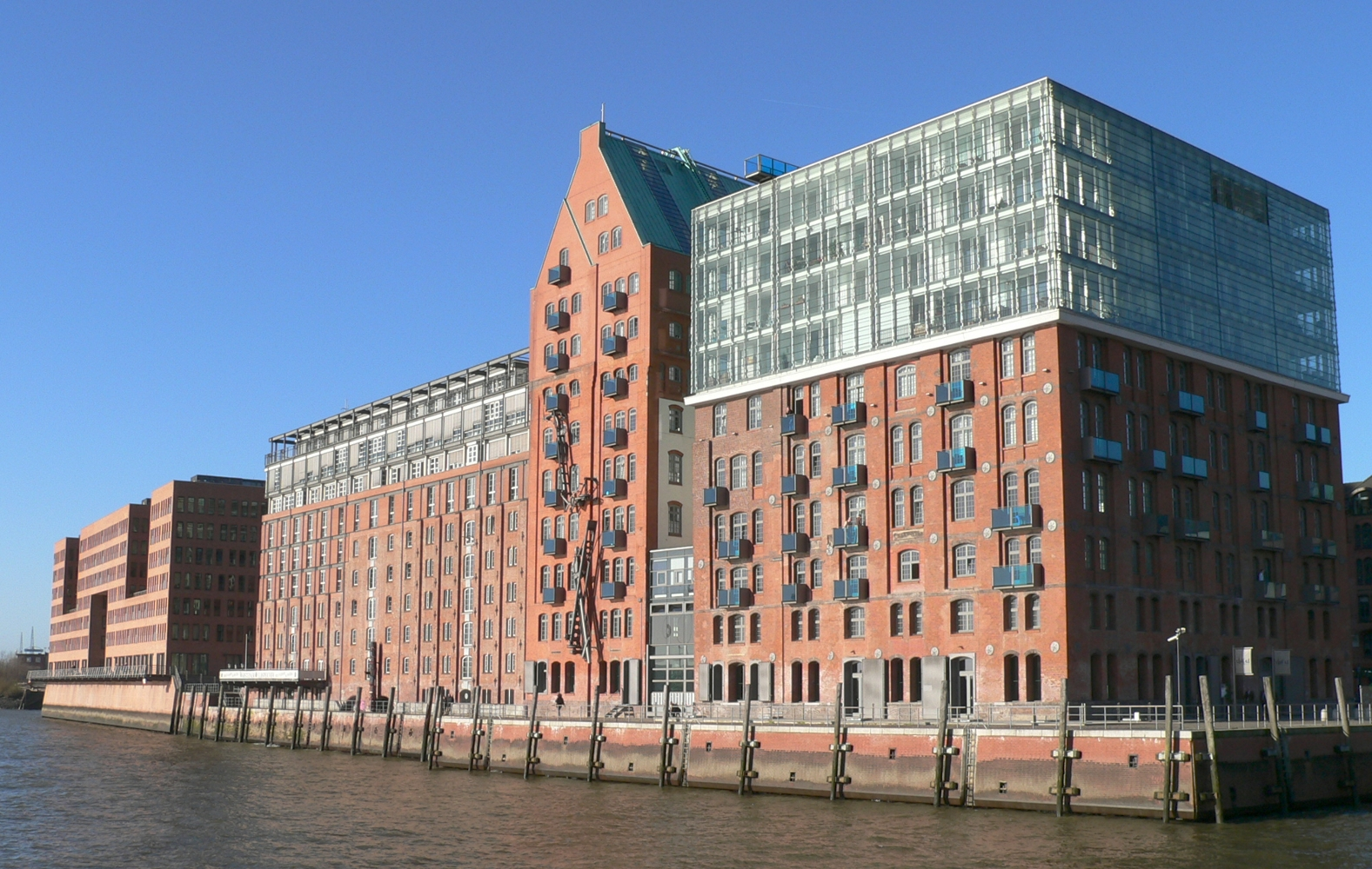 Stadtlagerhaus, Hamburg, Große Elbstraße, Umbauten: Jan Störmer